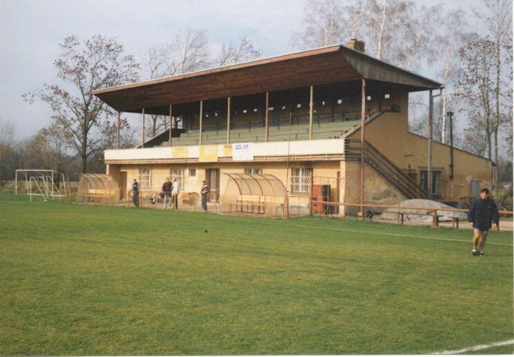 Tribuna